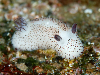 Jorunna parva, a 6 m, Osezaki, Japón